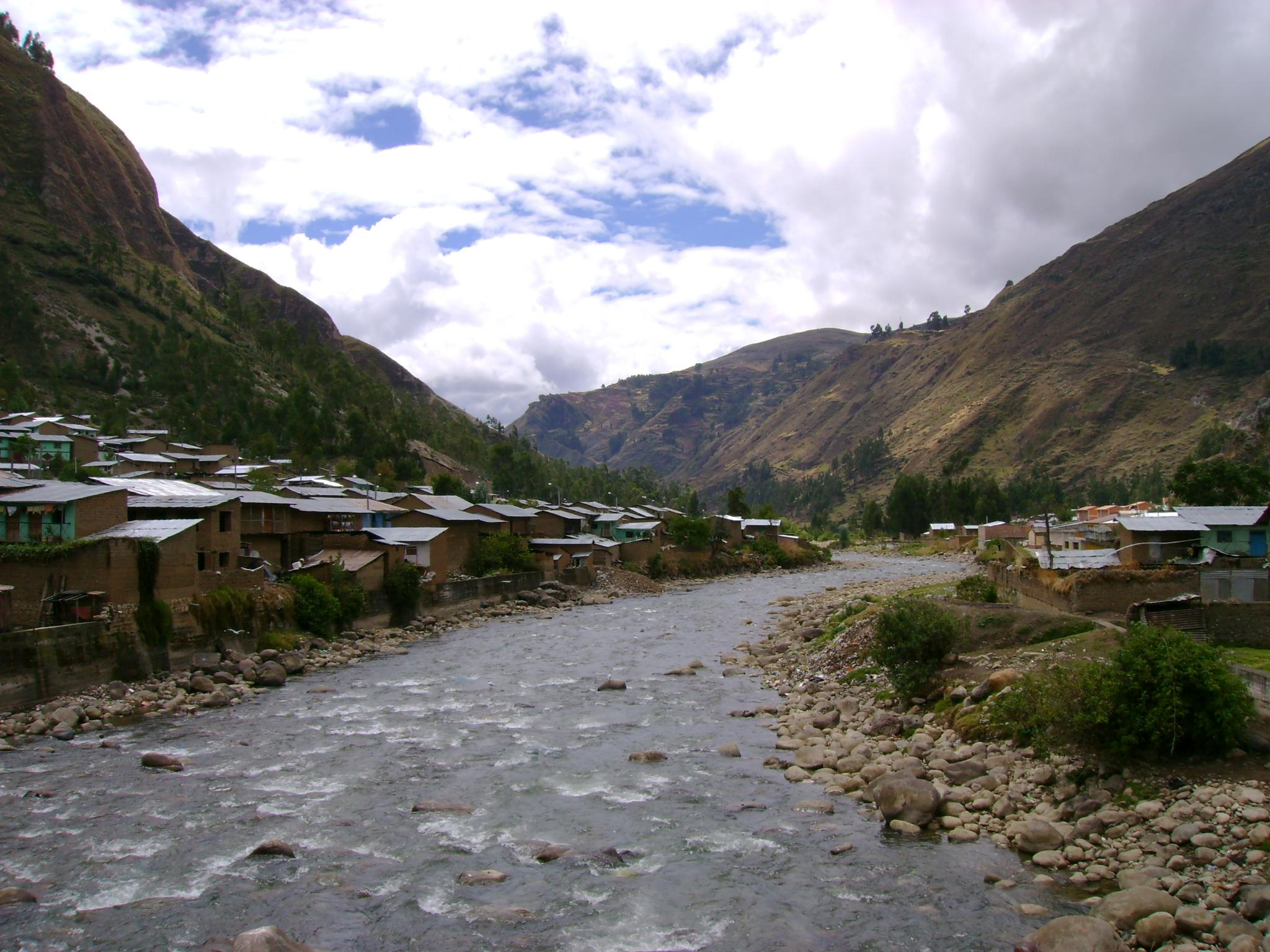 Río Vizcarra.